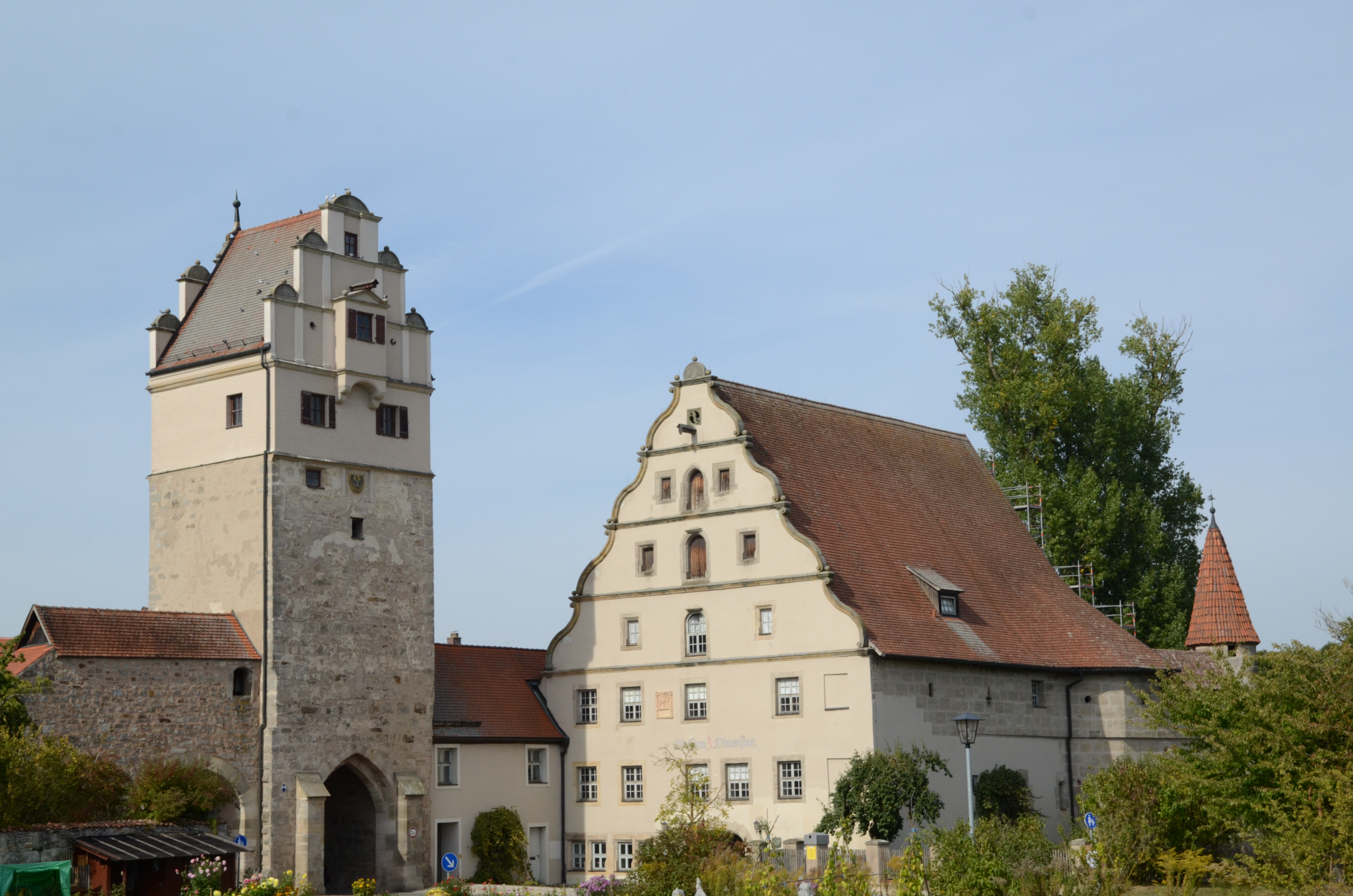 Dinkelsbühl Mönchsrother Straße 1